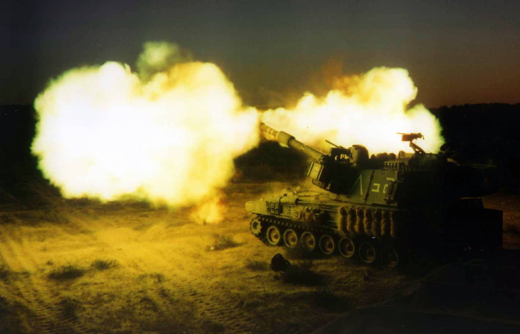 M109 howitzer AL